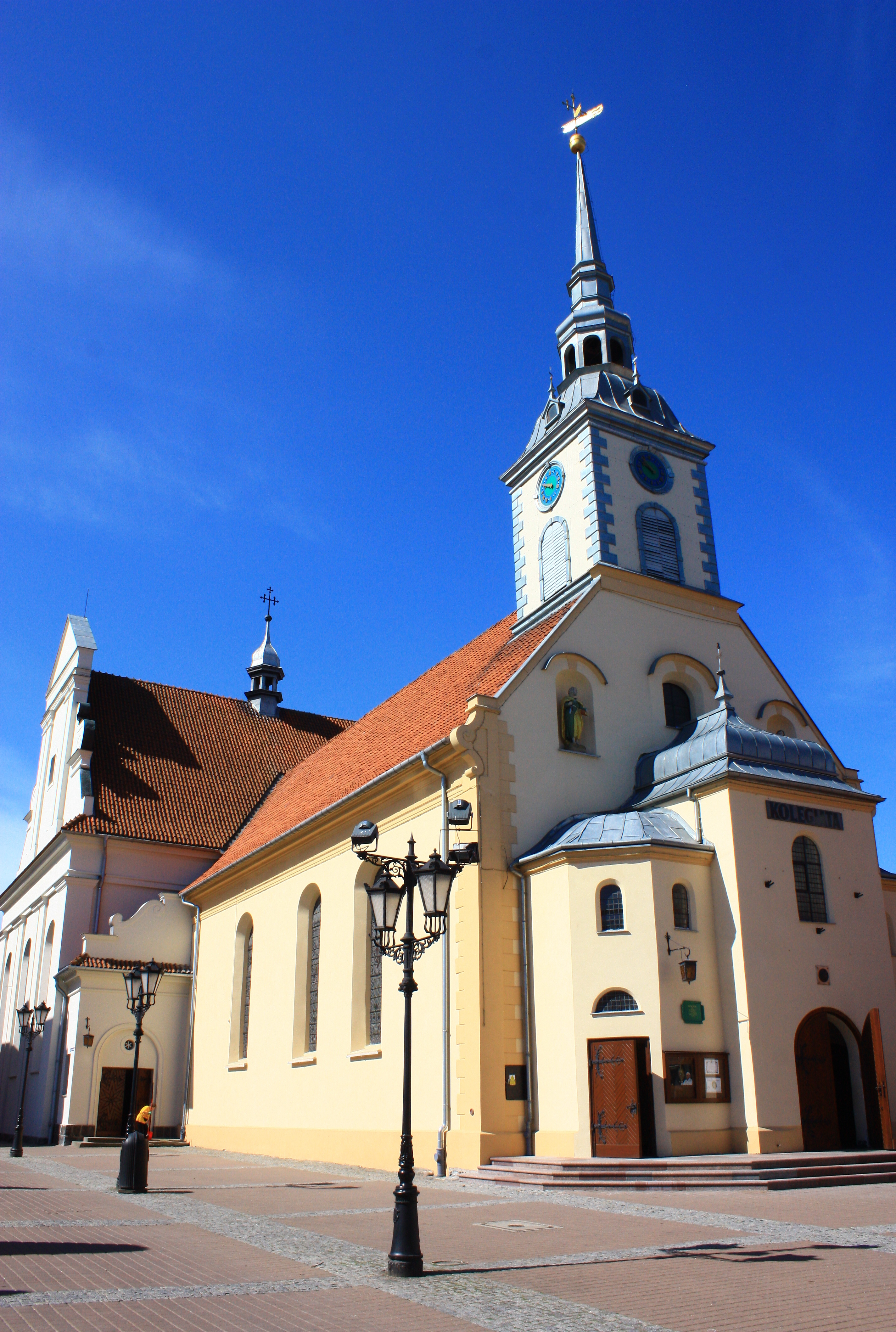 Wejherowo, Rynek / ul. Kościuszki - zespół kościoła par. p.w. Św. Trójcy, 1754-1755